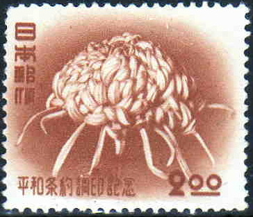 連合国に対する日本の平和条約調印記念の2円切手。描かれているのは菊の花である。